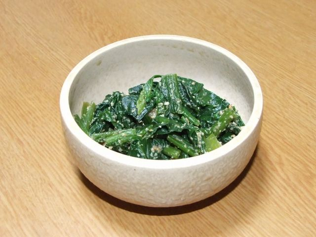 Hourensou-Gomaae